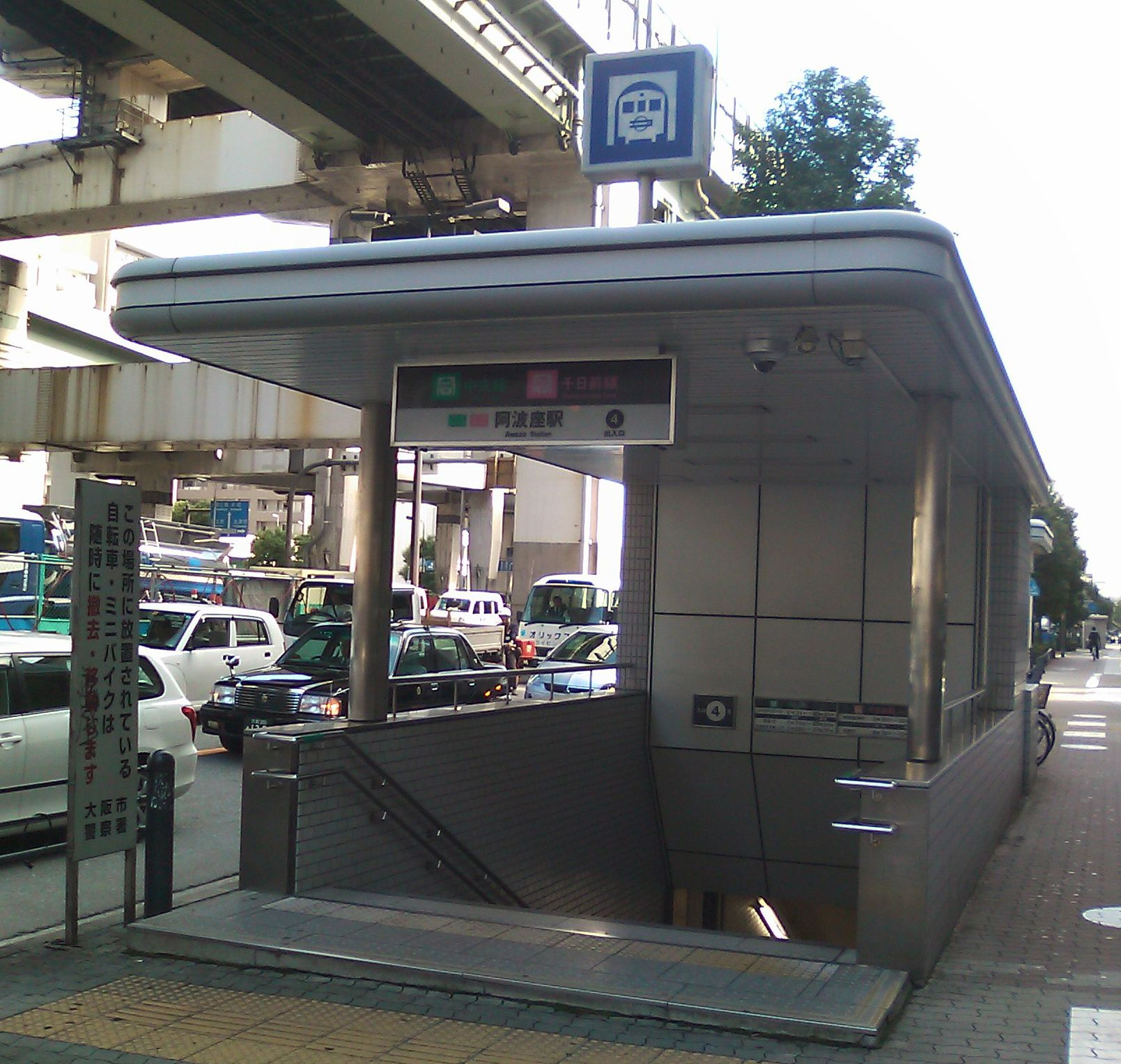 中央線/千日前線 阿波座駅 4番出入口